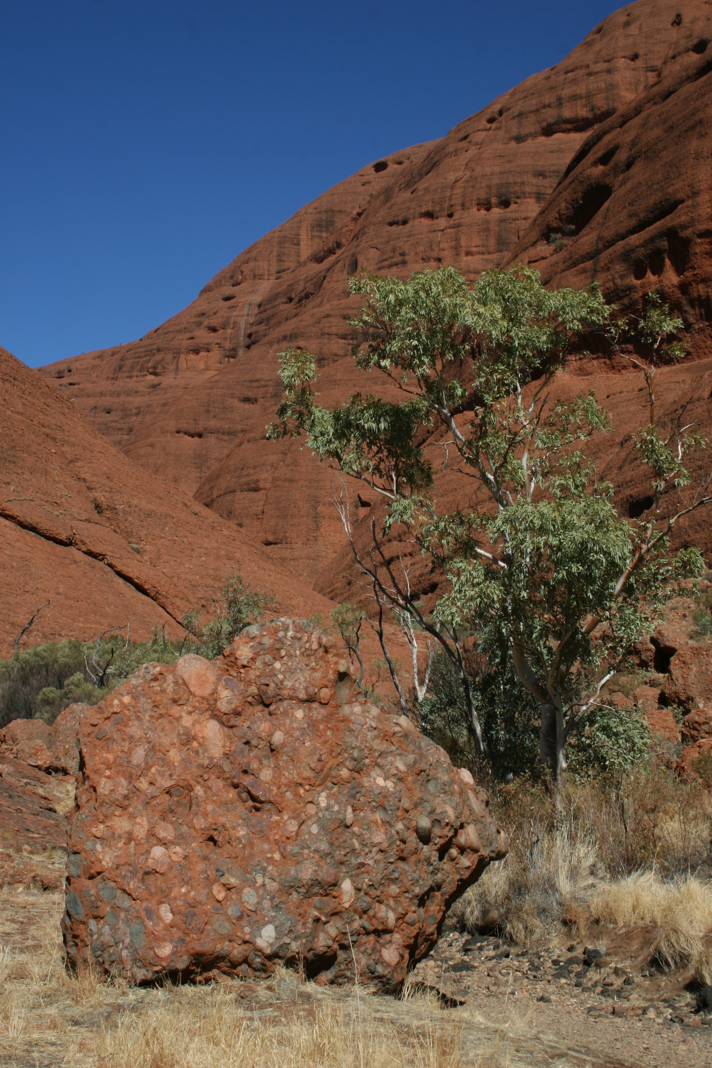 Konglomeratstruktur am Kata Tjuta, Australien